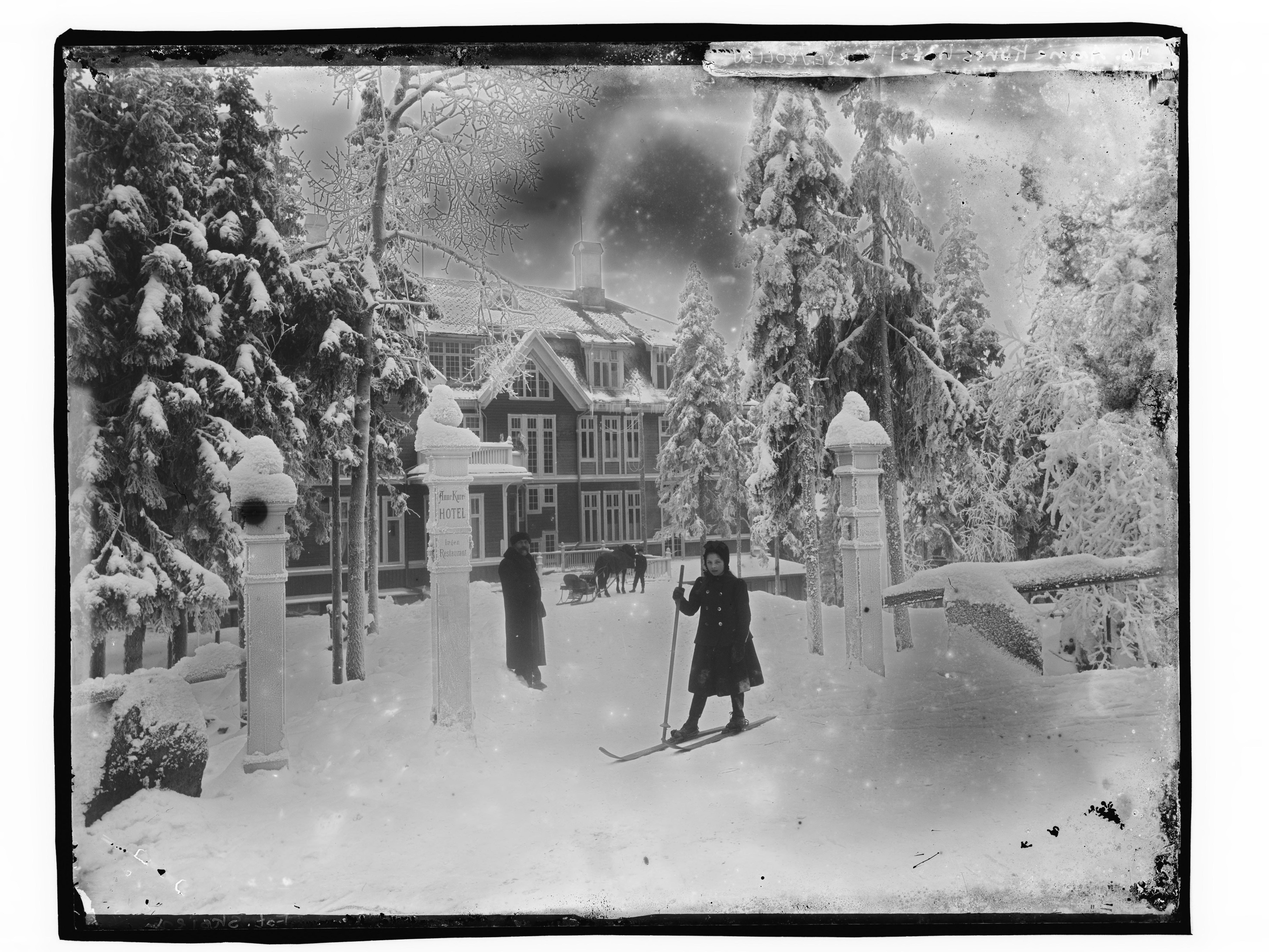 Påskrift negativ: 46. Anne Kures hotel. Voksenkollen Fot. Skøien [Riksantikvaren] Påskrift konvolutt: B-46 V.Aker. Voksenkollen. Anna Kurer´s hotel. [Riksantikvaren] Sted: Vestre Aker,Voksenåsen Kommune: Oslo Fylke: Oslo Tagger: Anne Kures hotel hotell fasade port vinter jente skigåing mann